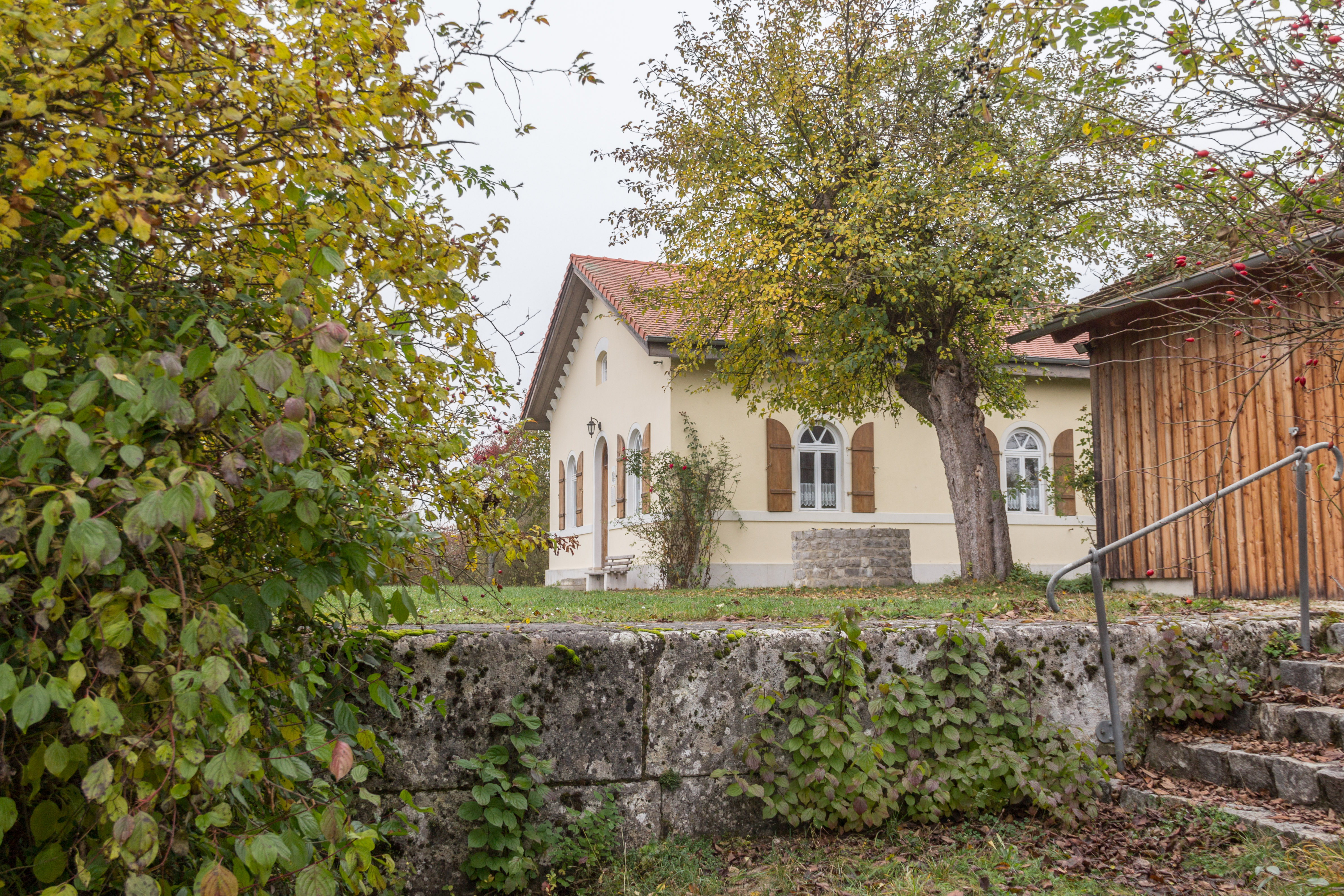 Ludwig-Donau-Main-Kanal, Schleuse 13, Schleusenwärterhaus mit Resten der Schleusenkammer, Dietfurt